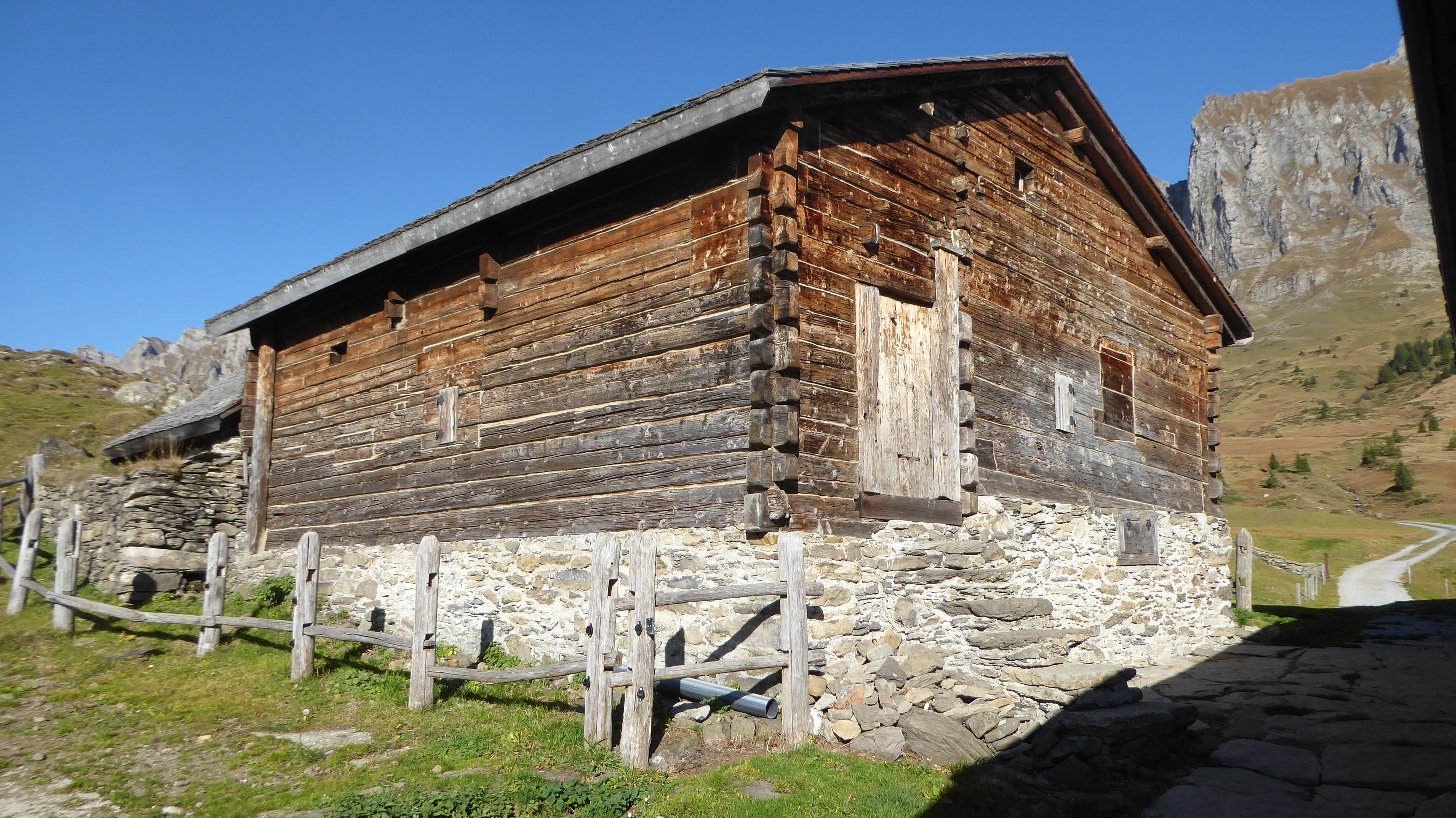 Rathaus Palfries von Südwest